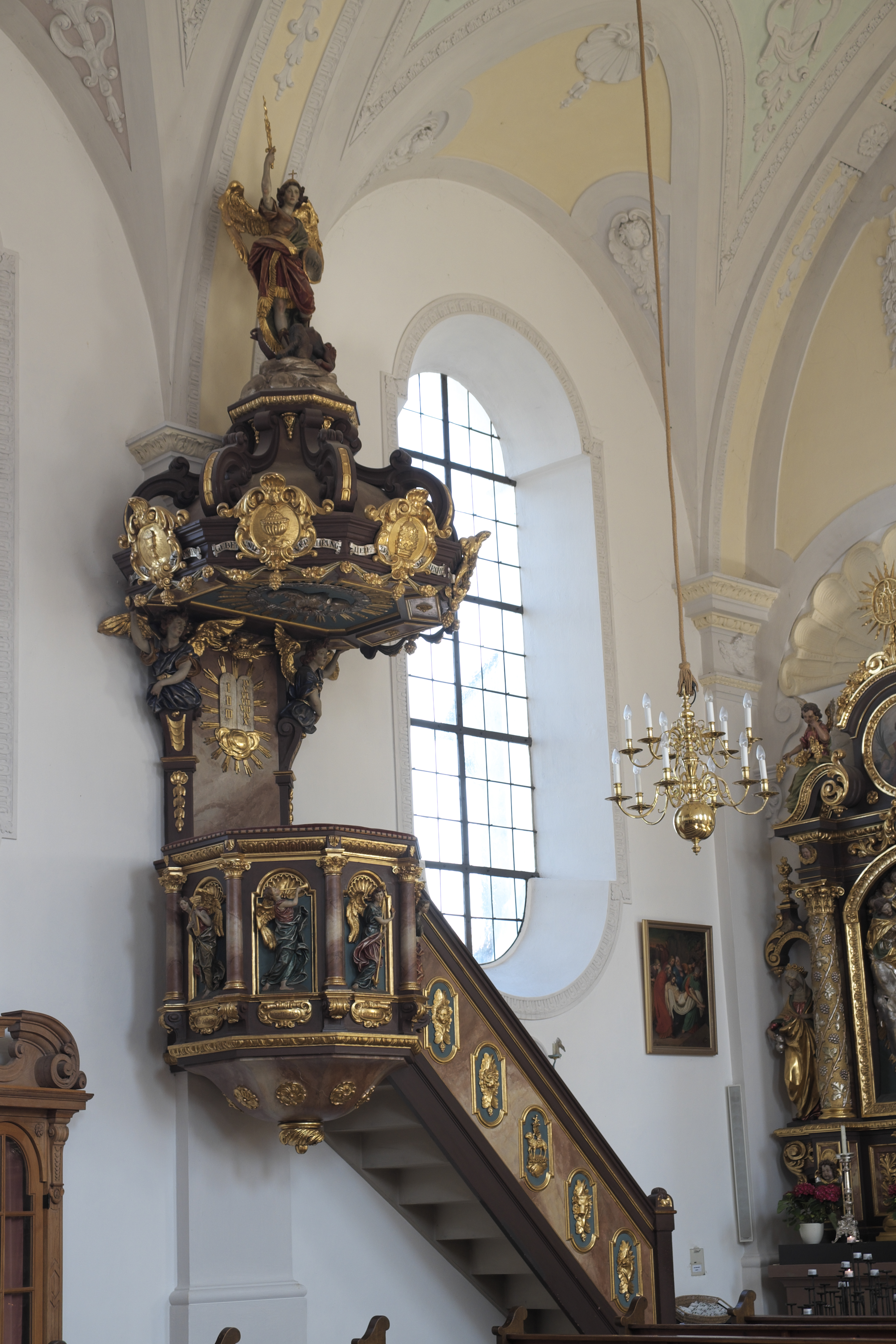 Katholische Pfarrkirche St. Michael in Seeshaupt im Landkreis Weilheim-Schongau (Bayern/Deutschland), Kanzel